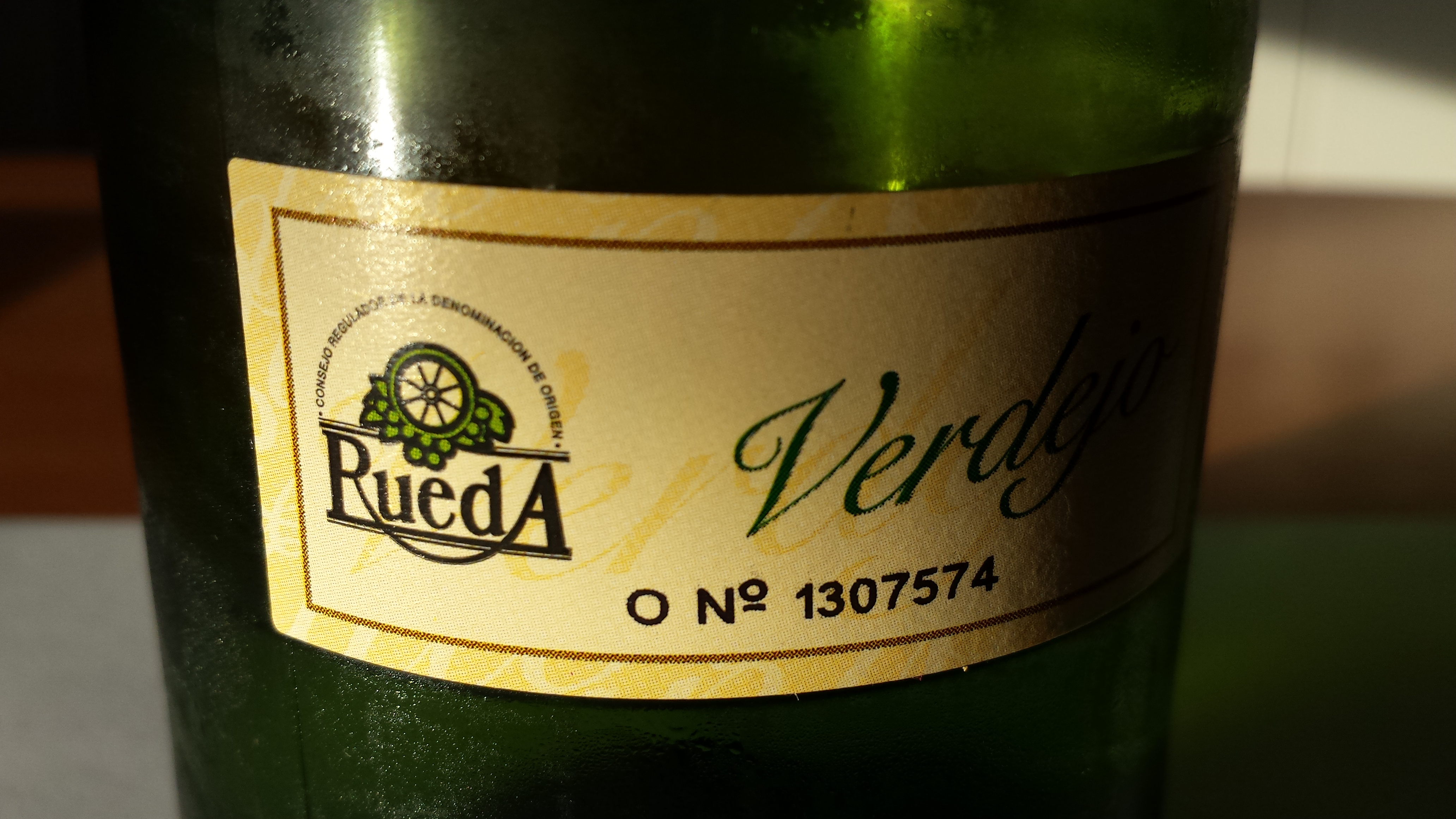 Etiqueta de vino de la DO Rueda, Valladolid, Segovia y Ávila, España.